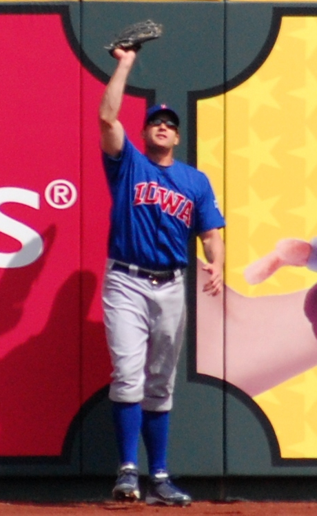 Brad Snyder